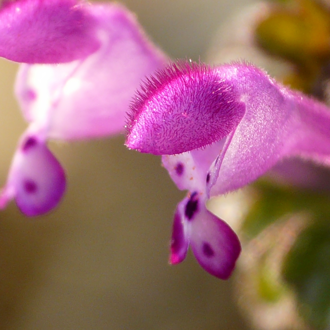 FZ18+Raynox DCR-250